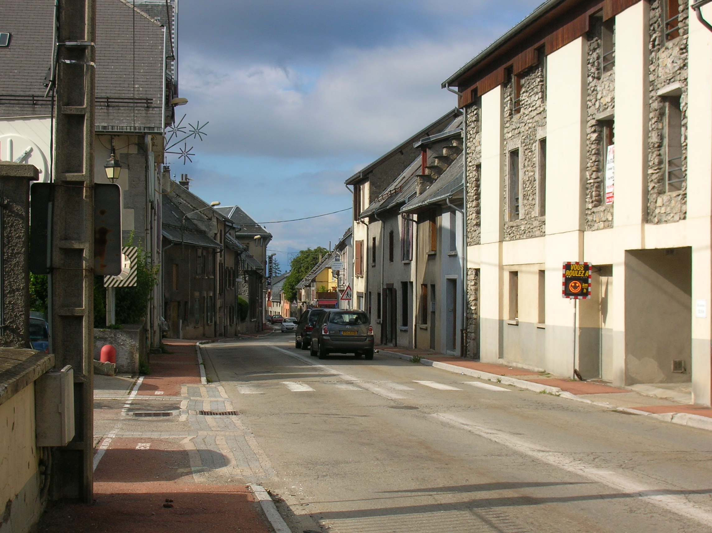 Laffrey